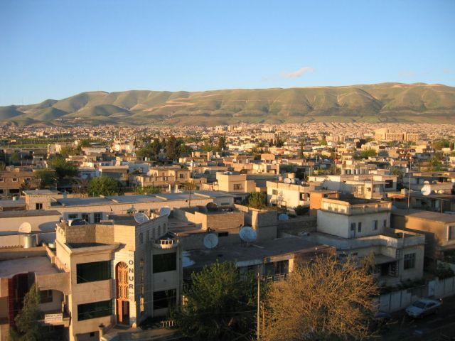 Sulaymaniyah, panorama.